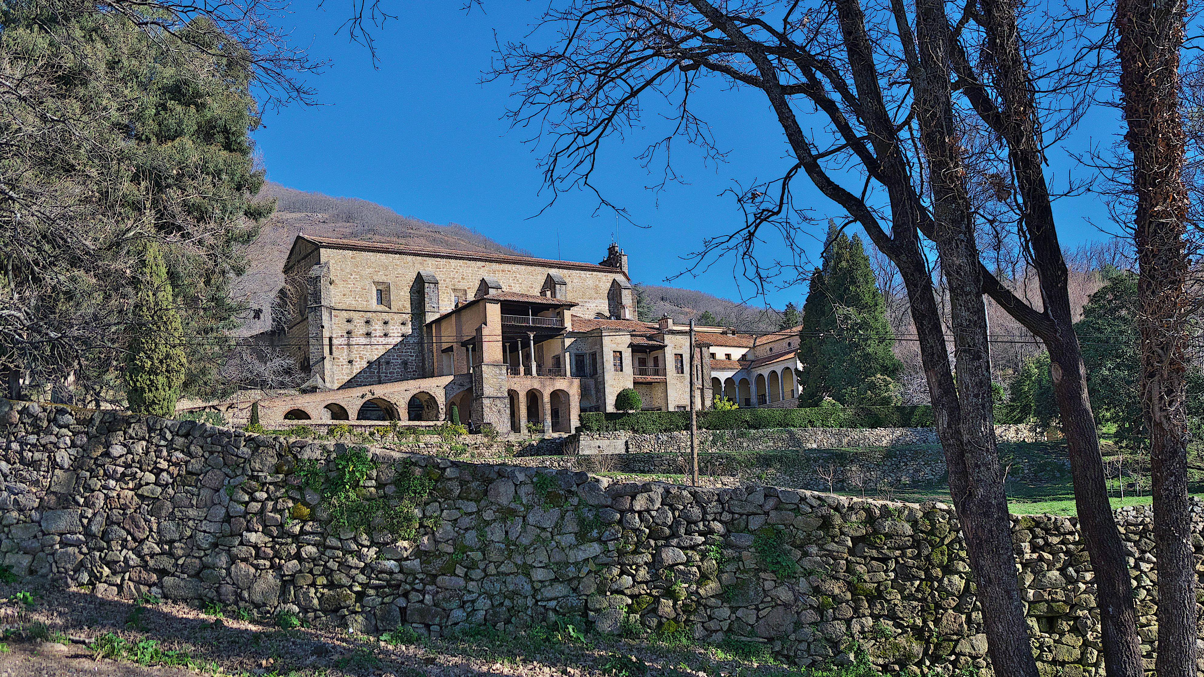 Desde el 26 de julio de 1415 bajo la protección de la Orden Jerónima. Hoy, en posesión del poder político.